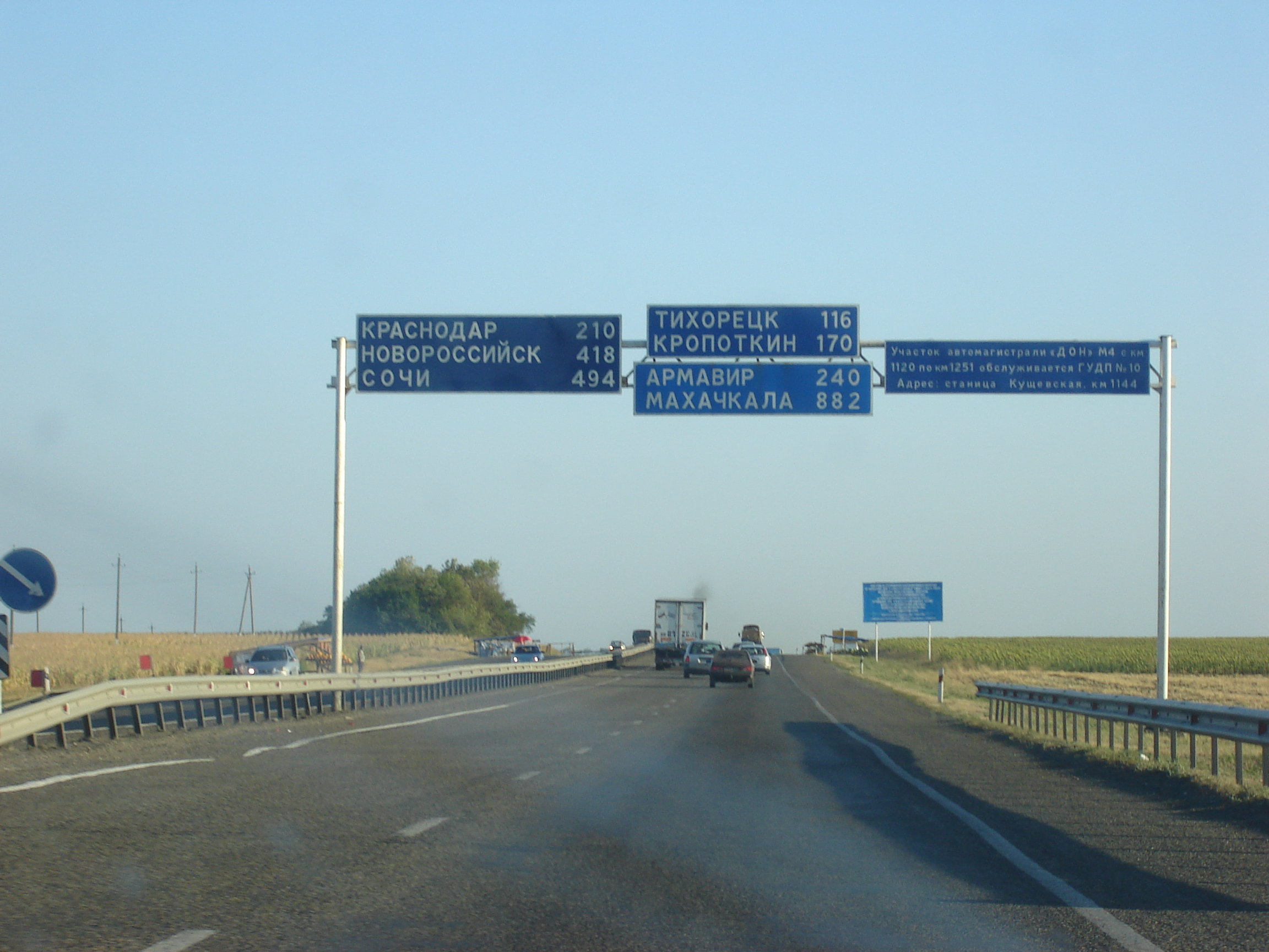 куда дальше хочеться??